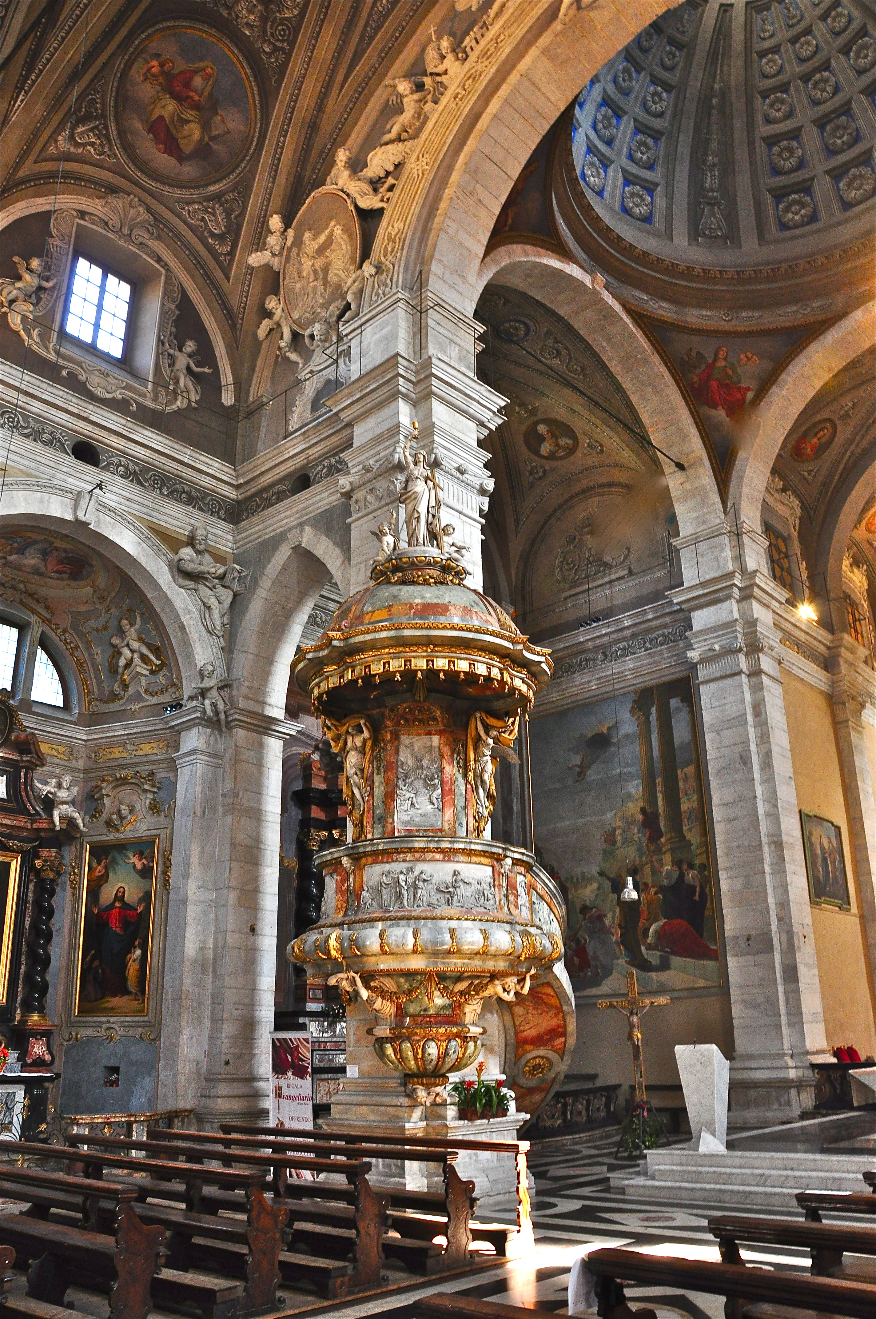 L'interno, barroco.